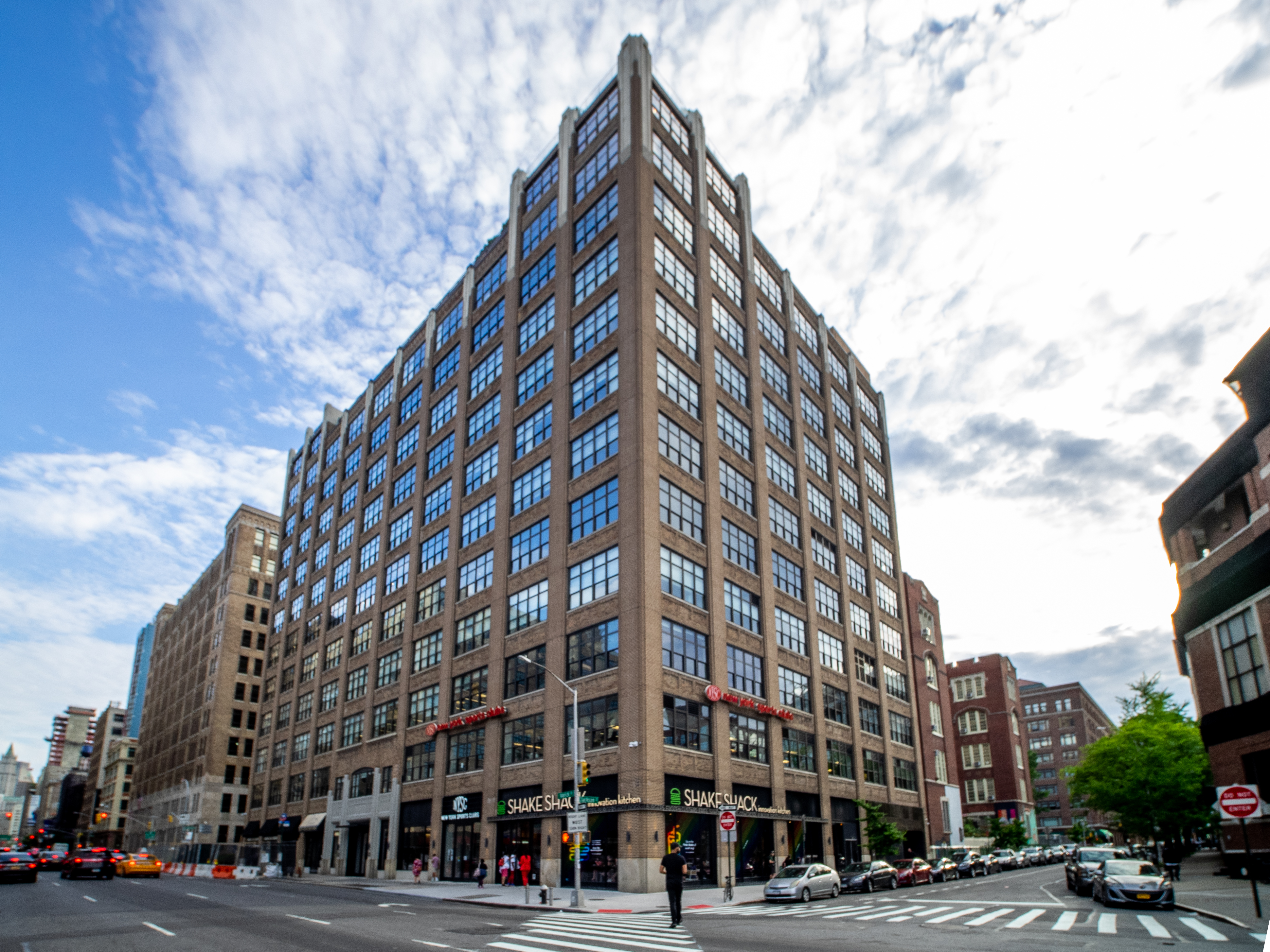 Greenwich Village, NYC